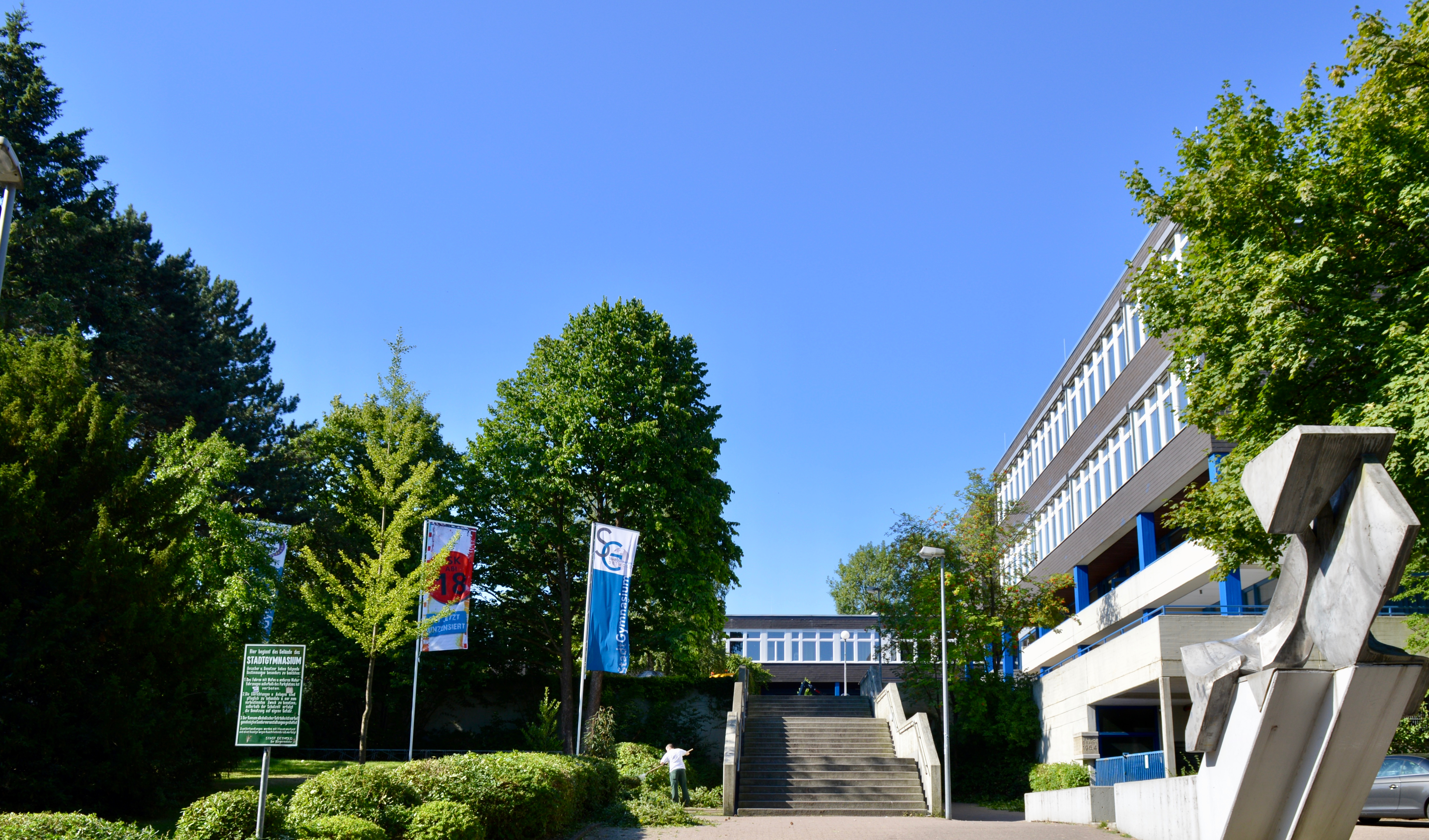 Das Bild zeigt das Hauptgebäude und im Hintergrund den Fachklassentrakt des Stadtgymnasiums Detmold. Im Vordergrund links sind die Fahnen der Europaschule, des Abiturjahrgangs und der Schule zu sehen.